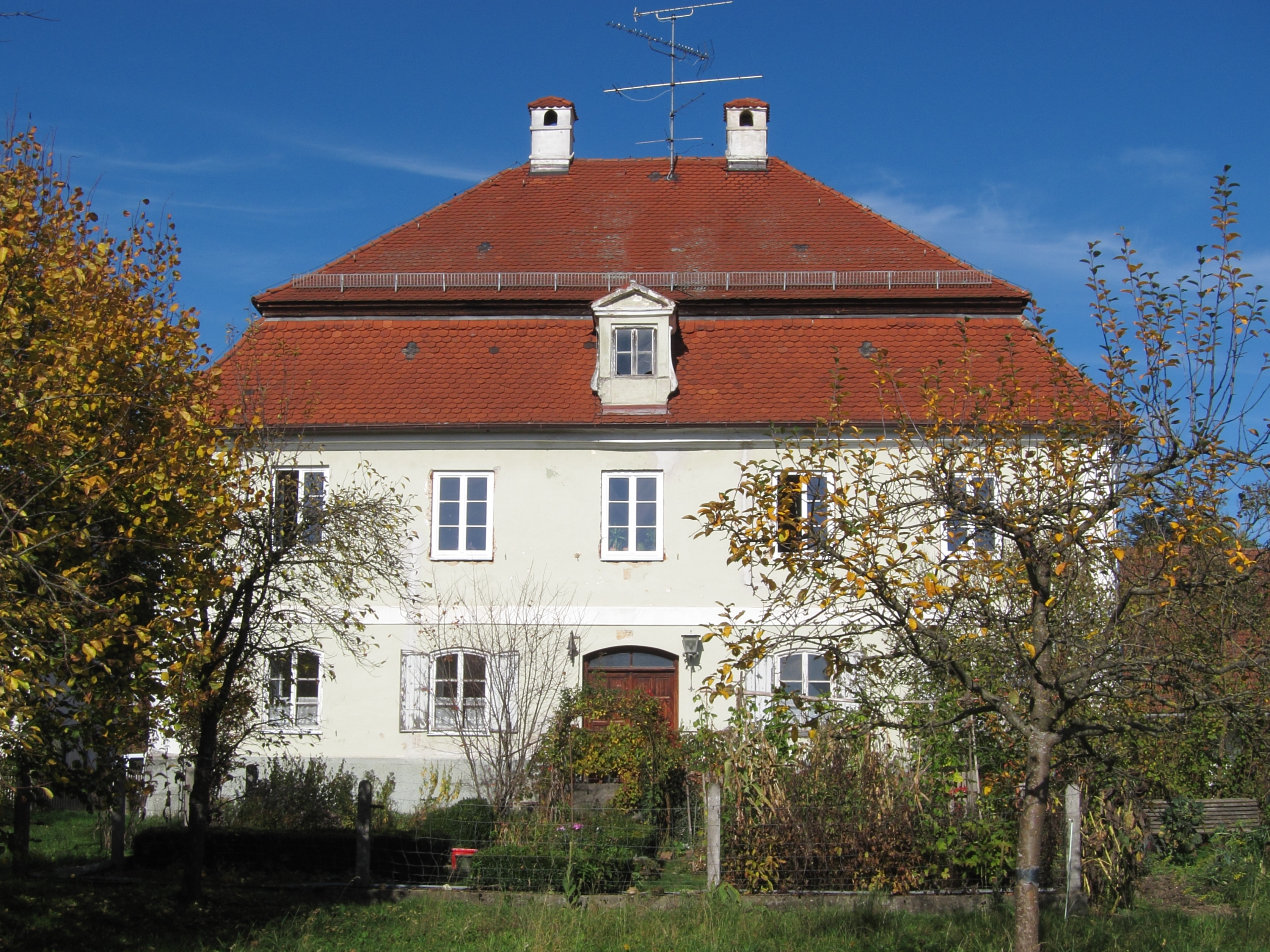 Ehemaliger Pfarrhof; zweigeschossiges ehemaliges Pfarrhaus mit Mansardwalmdach, in spätbarockem Stil erbaut zwischen 1740 und 1747.